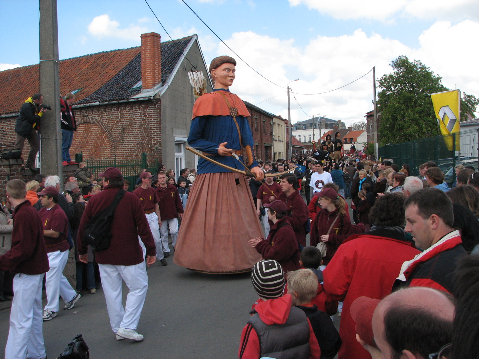 L'Archer, géant de Bois de Lessines Photo personnelle 2005 Pas de copyright